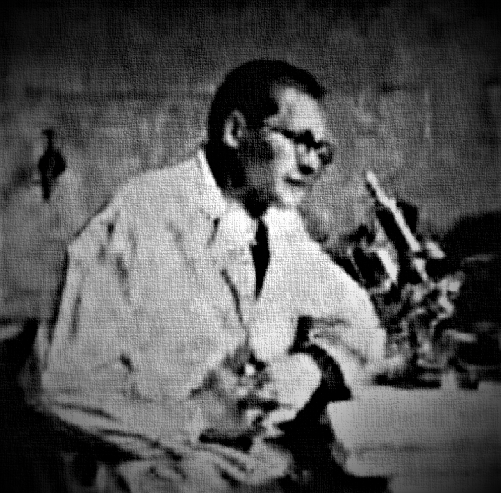 Paul Cretzoiu (1909-1946), botanist român